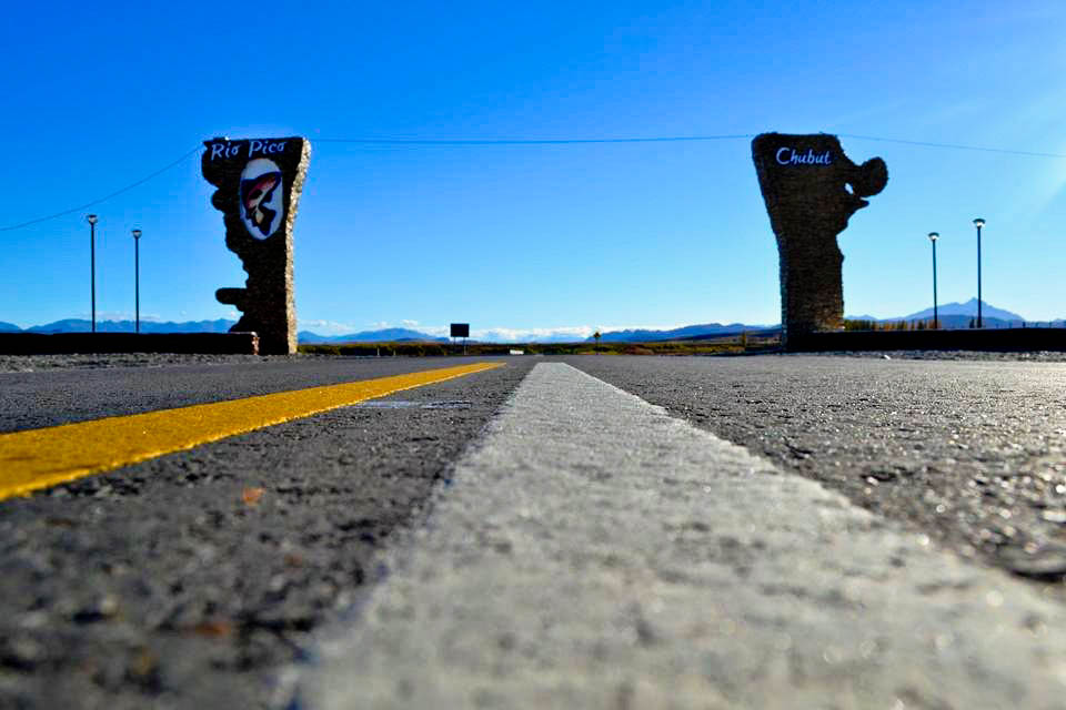 Portada de acceso a la localidad, sobre ruta N19